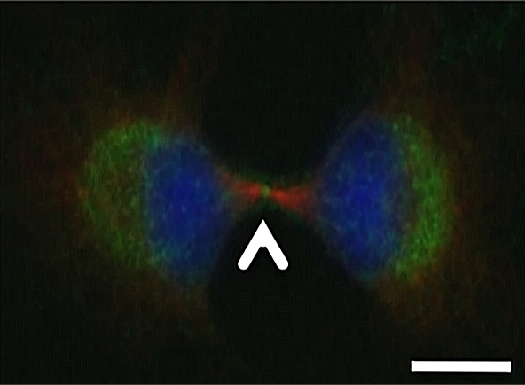 Figura 3. En la citocinesis, se observa la Ccdc124 como puncta, típicamente asociada con el cuerpo intermedio de Flemming, colocado en el medio del puente intercelular que separa las células hijas. Inmunocitoquímica: recubrimientos con anti-γ-tubulina y anti-α-tubulina Abs, respectivamente. Barras de escala representan 10 µm.